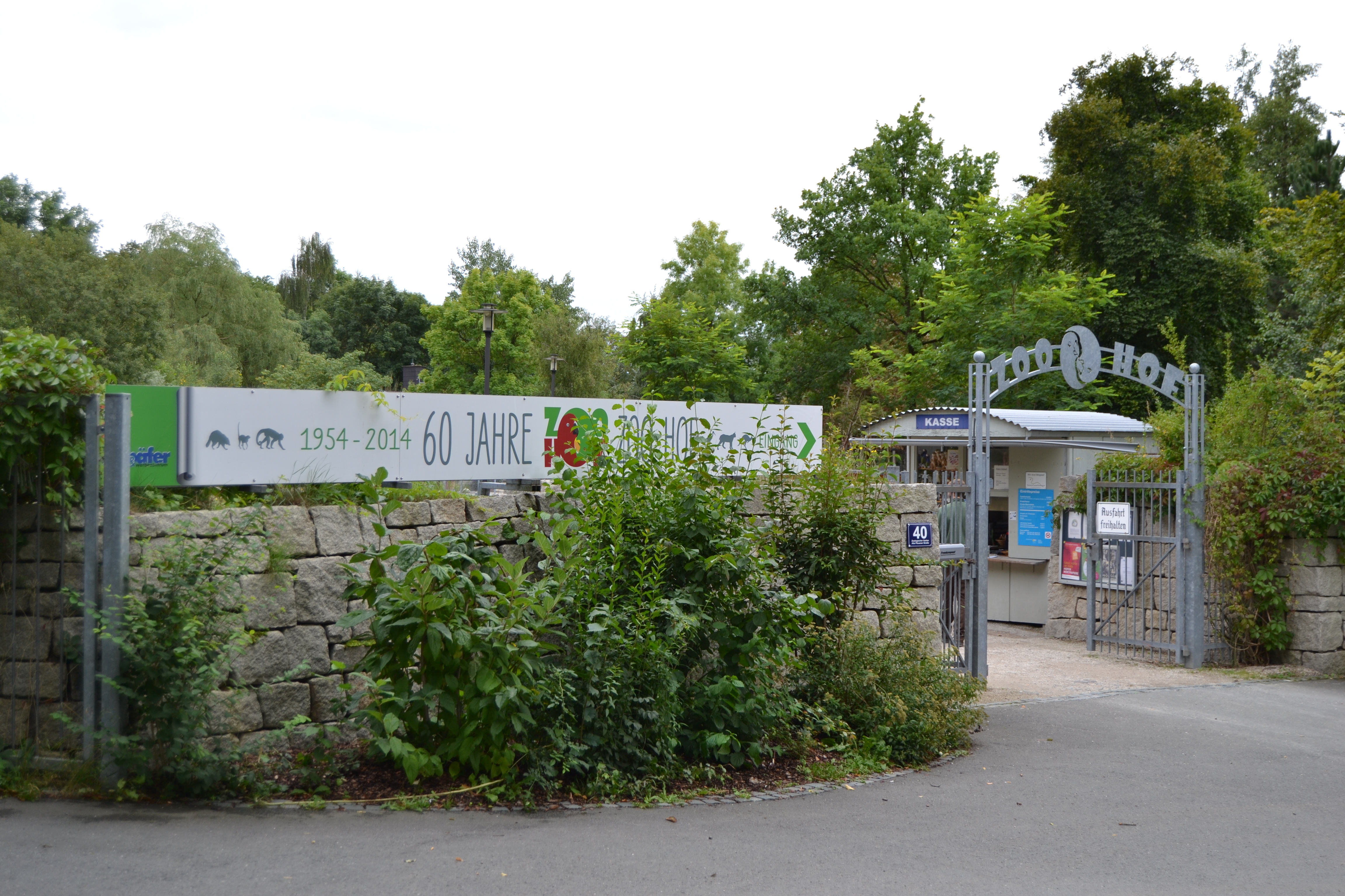 Eingang zum Zoologischen Garten Hof, Alte Plauener Straße 40